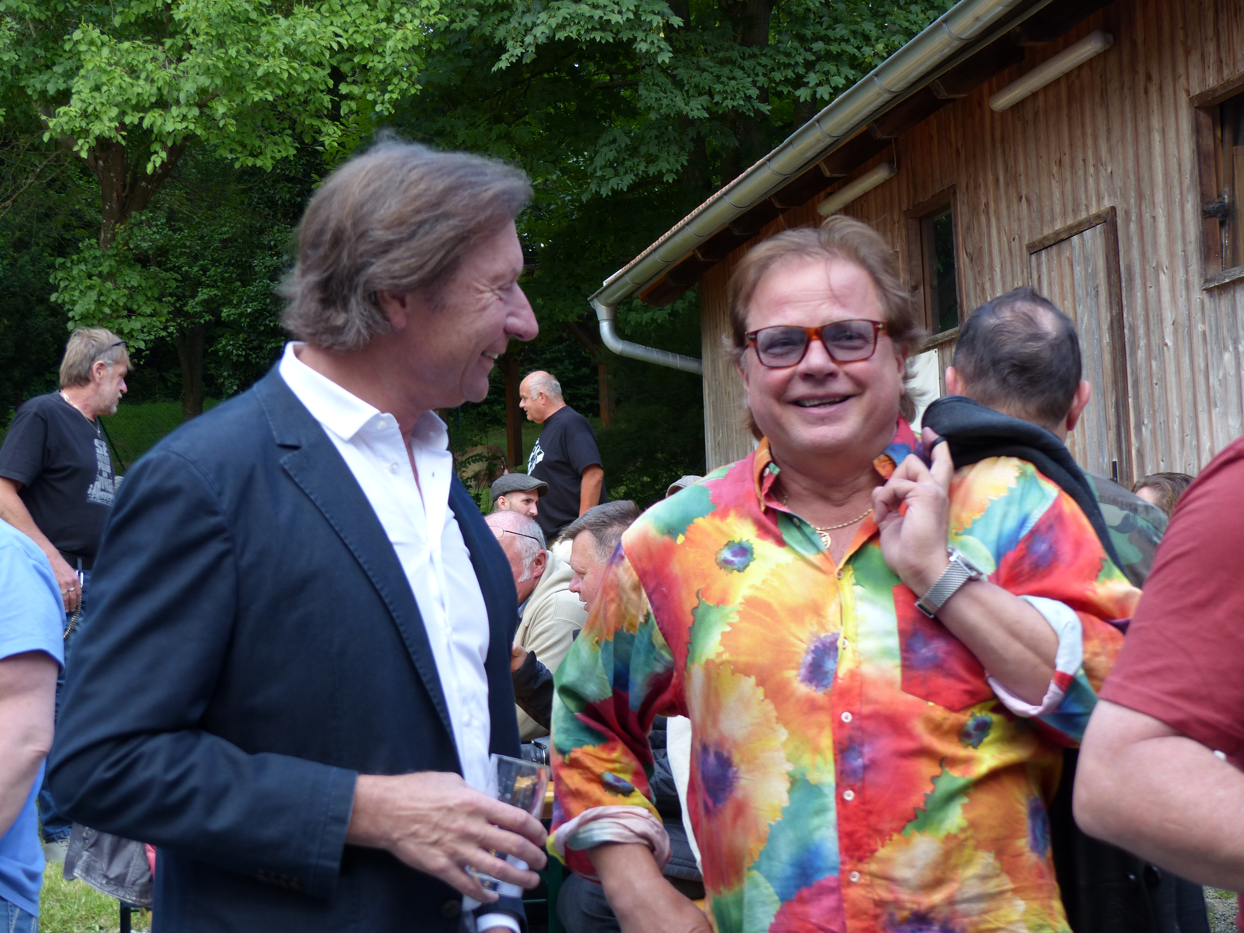 Der Bürgermeister von Pinkafeld, Kurt Maczek, zusammen mit dem Sänger der Band Opus, Ewald Pfleger, bei der Eröffnung der Sonderausstellung "40 Jahre AustriaRockFestival" im Stadtmuseum Pinkafeld.